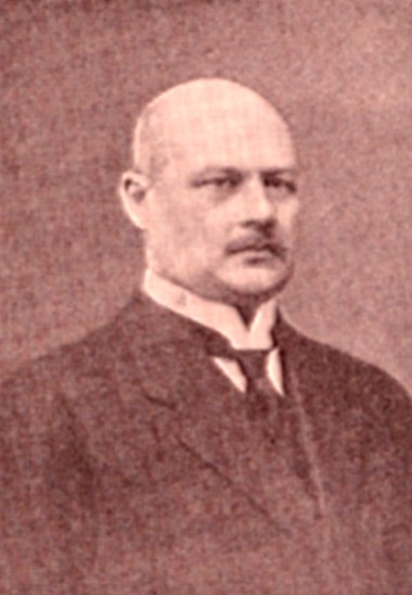 Description